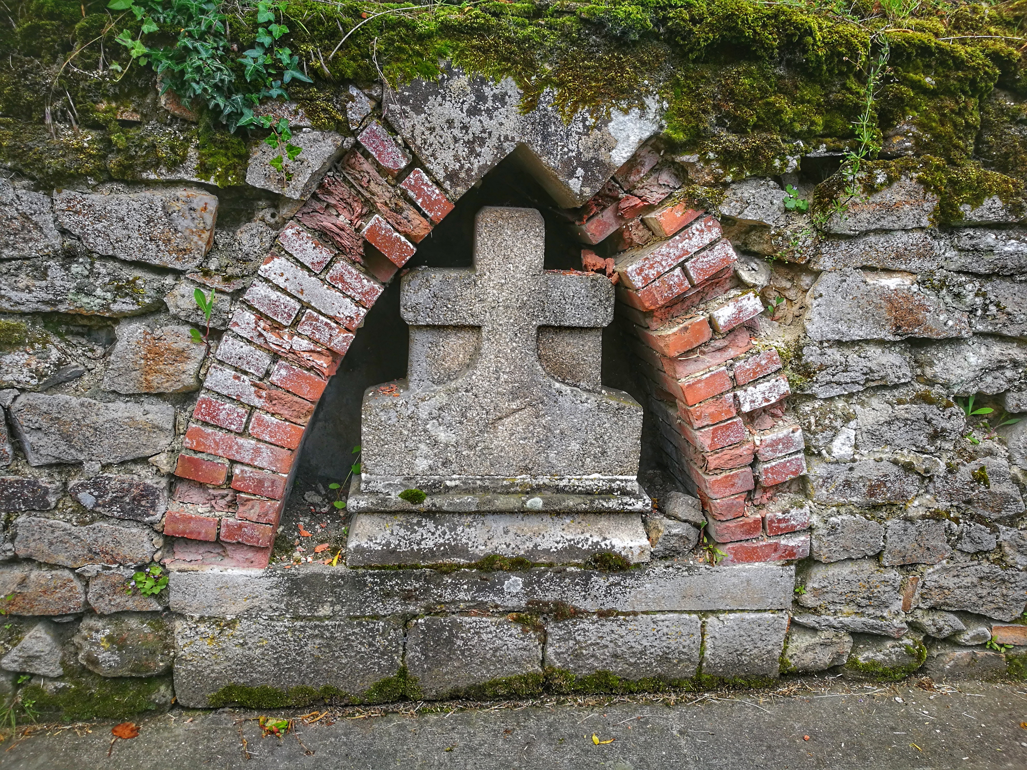 Vue d'une croix en pierre encastré dans un mur de la commune de Lourdoueix-Saint-Pierre, Creuse, France, le long de la Rue Principale du village.